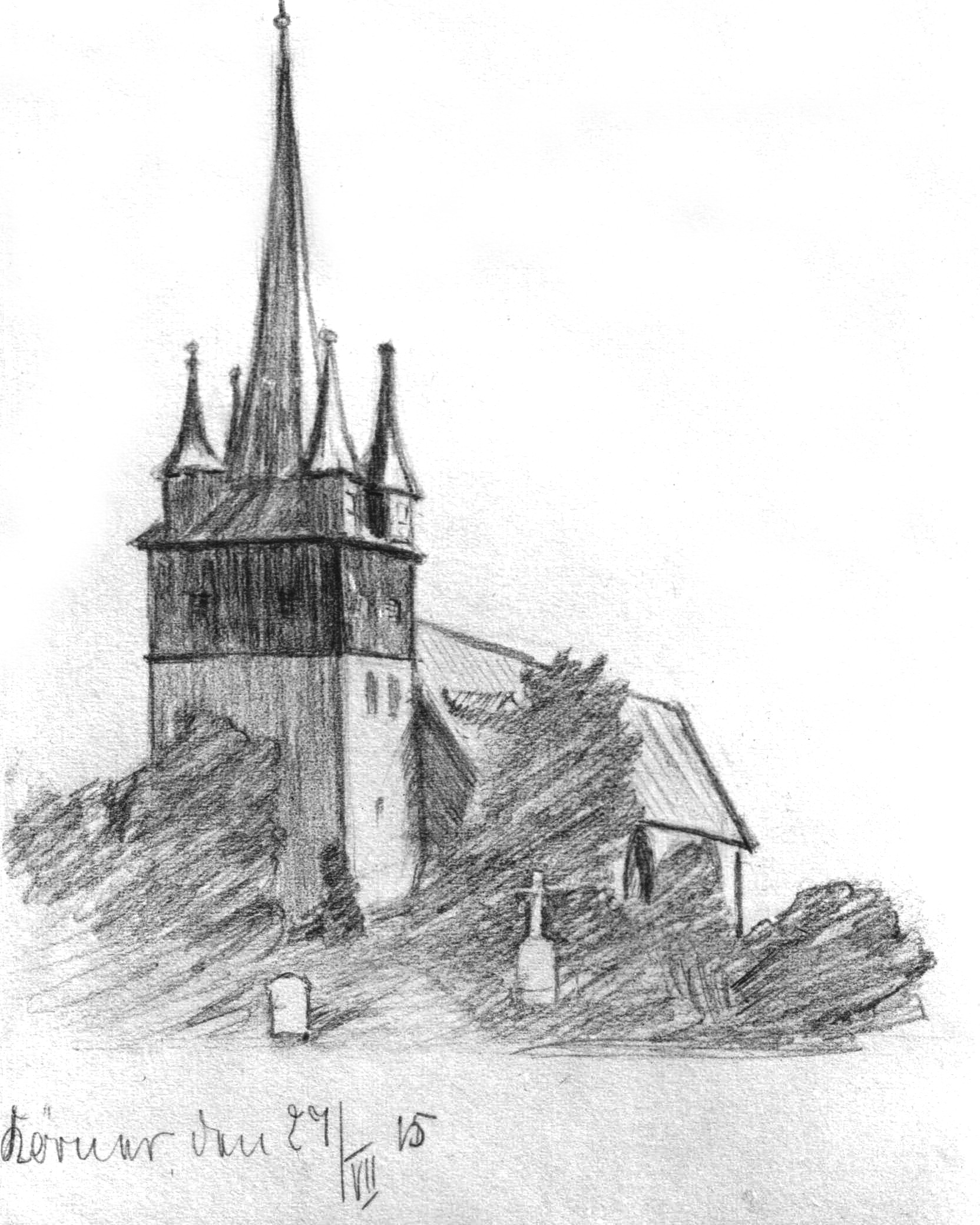 Die Oberkirche St. Wigberti in Körner, gezeichnet am 27. Juli 1915 von Erika Heußinger.